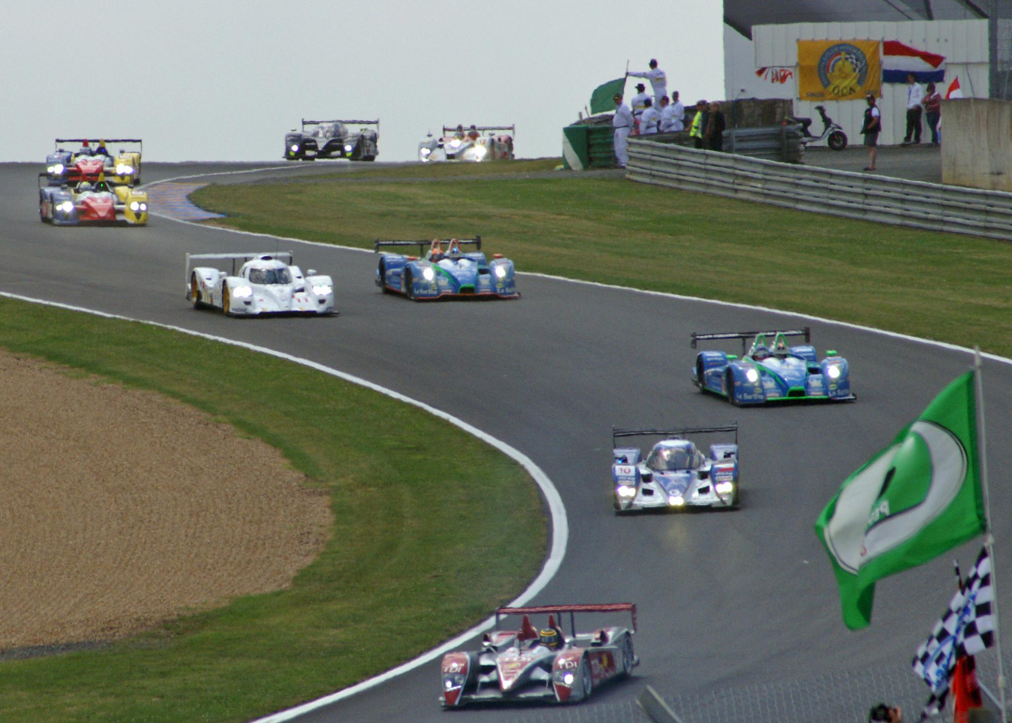 Le Mans 24 Hours 2008